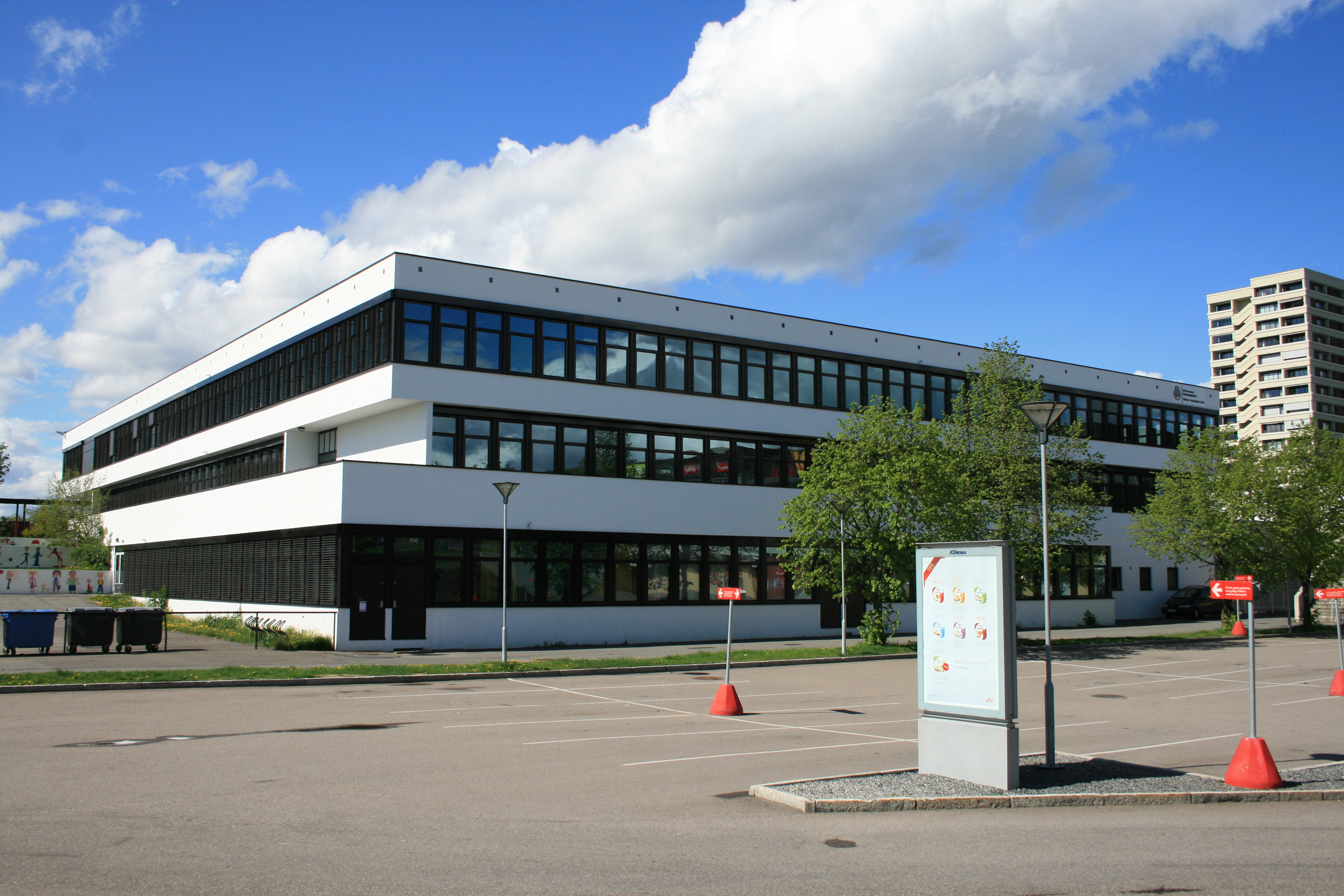 Hellerud videregående skole, Oslo.